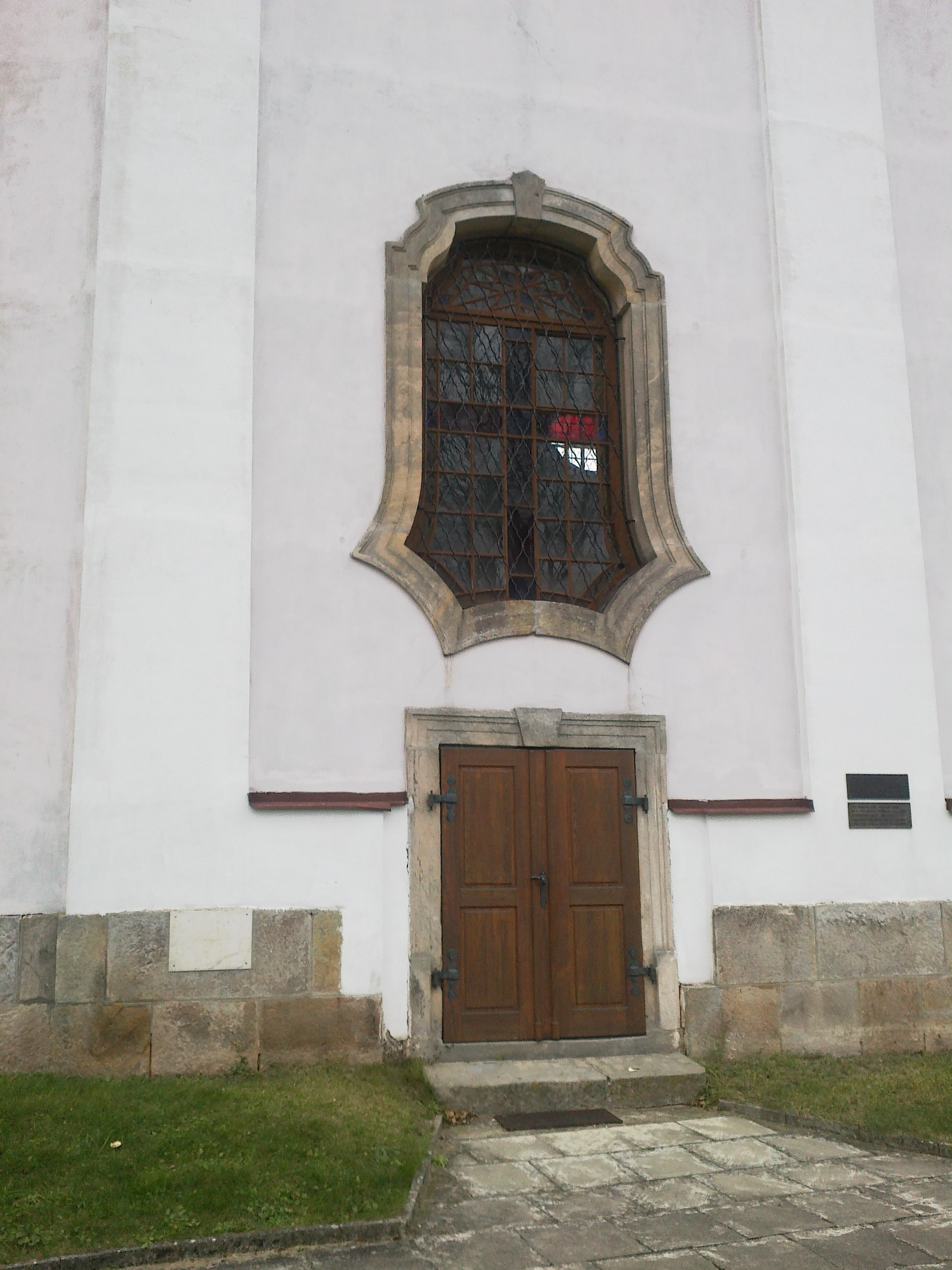 Hajnice - kostel sv. Mikuláše4